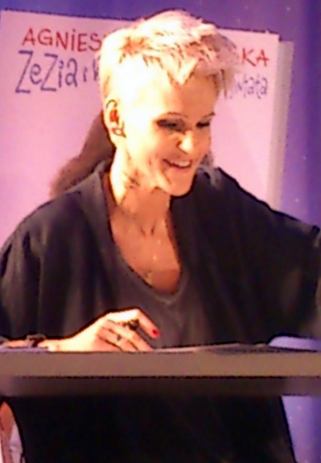 Agnieszka Chylińska, podpisywanie książki pt. "Zezia i wszystkie problemy świata".